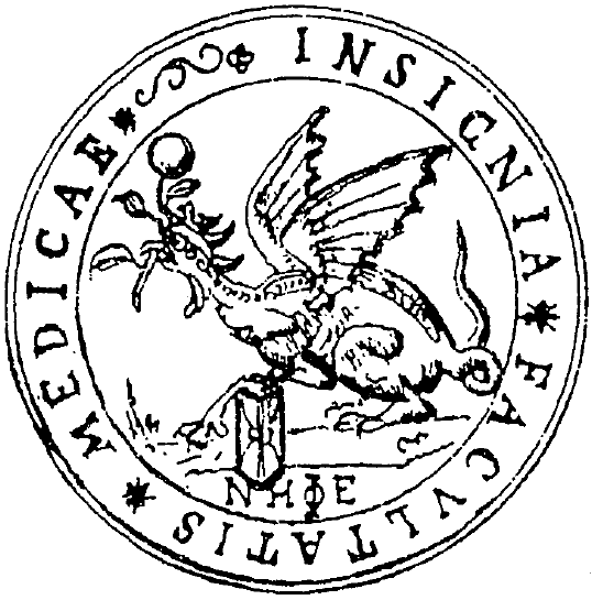 Originalsiegel der Medizinischen Fakultät der Universität Gießen vom Jahr 1607